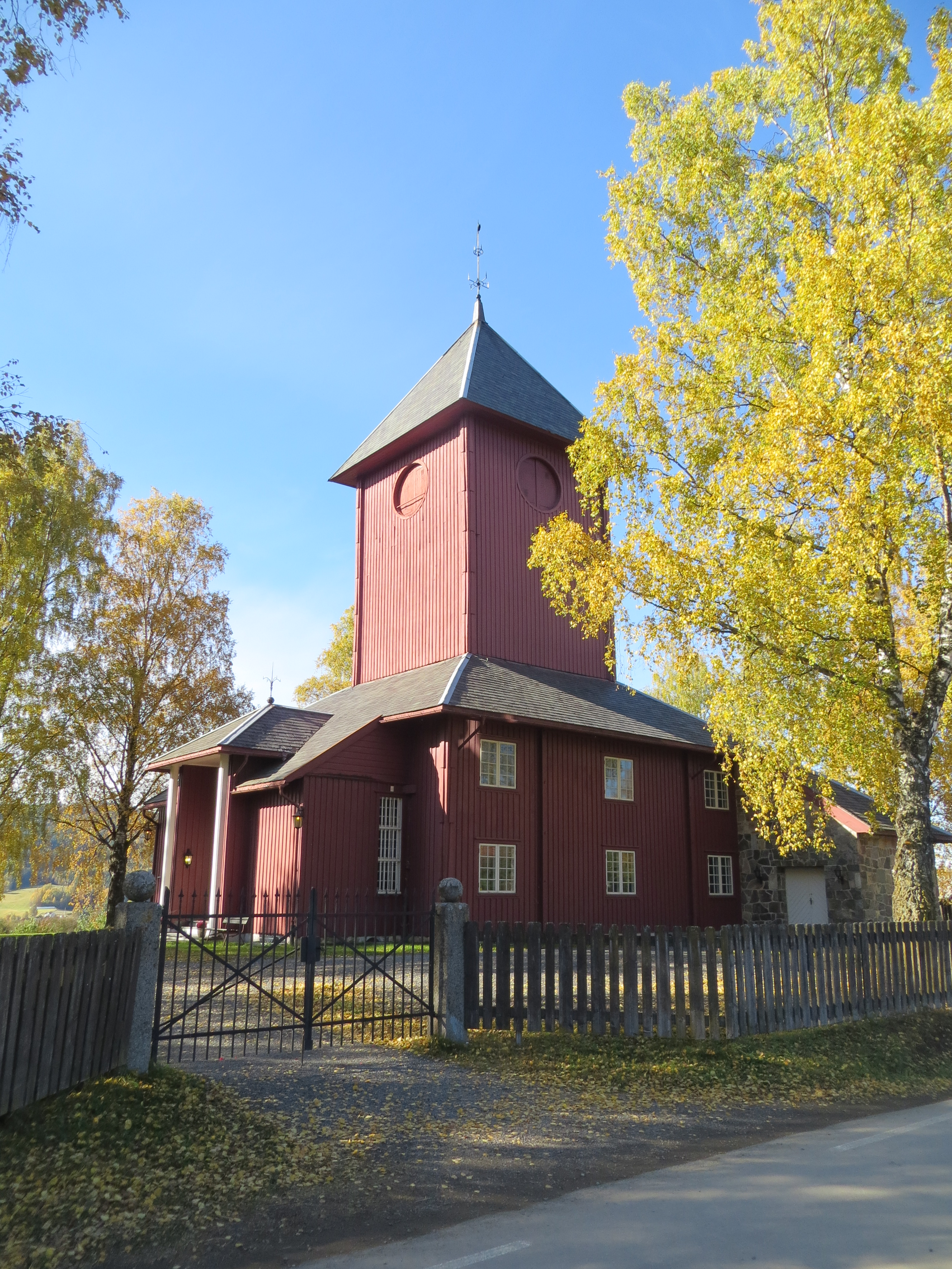 Ål church from 1929, municipality of Gran, Oppland county, Norway